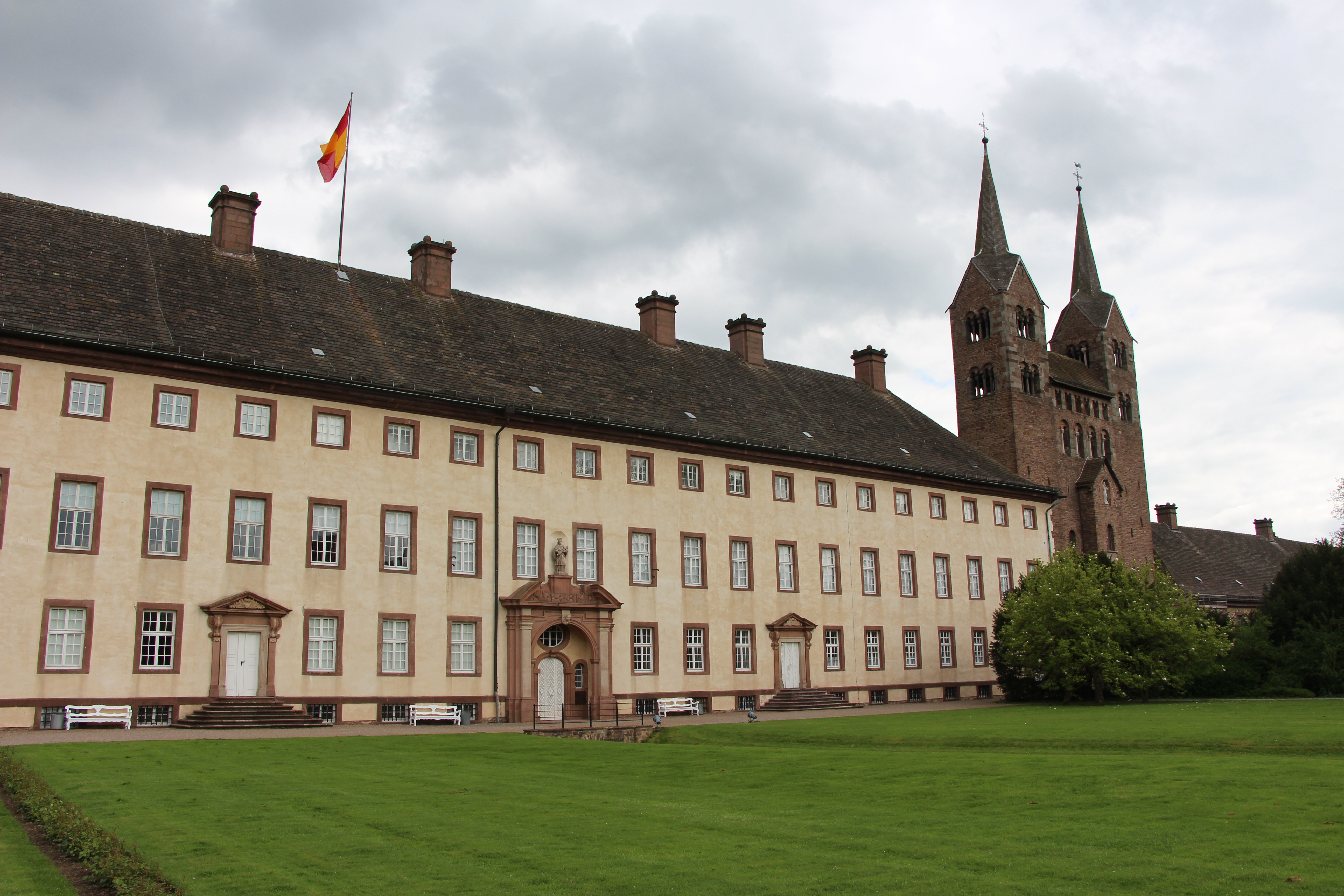 Corvey.